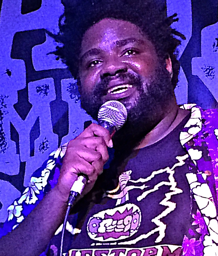 Hawaii 2014 970